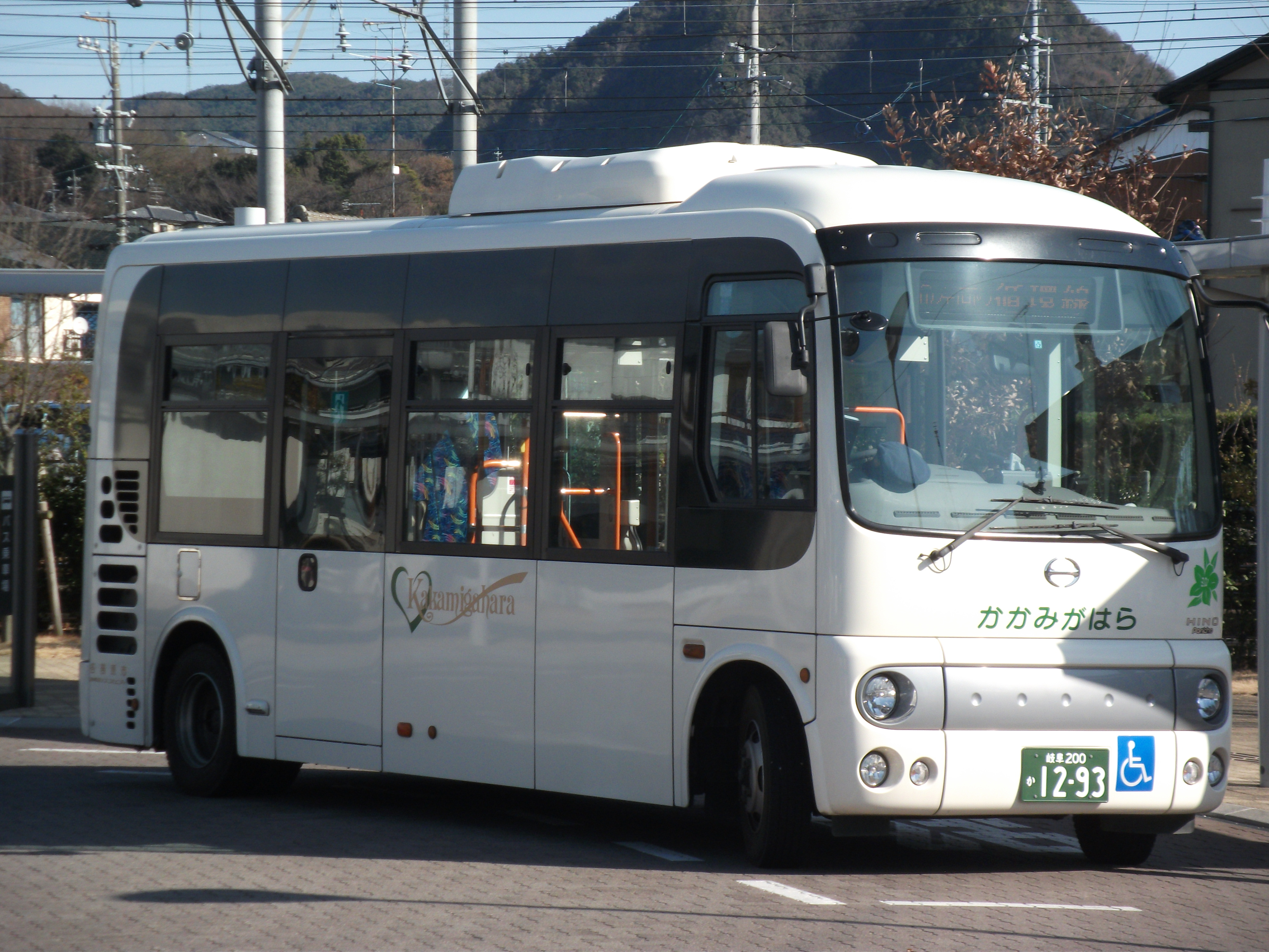 各務ヶ原ふれあいバス（名鉄新鵜沼駅前にて）